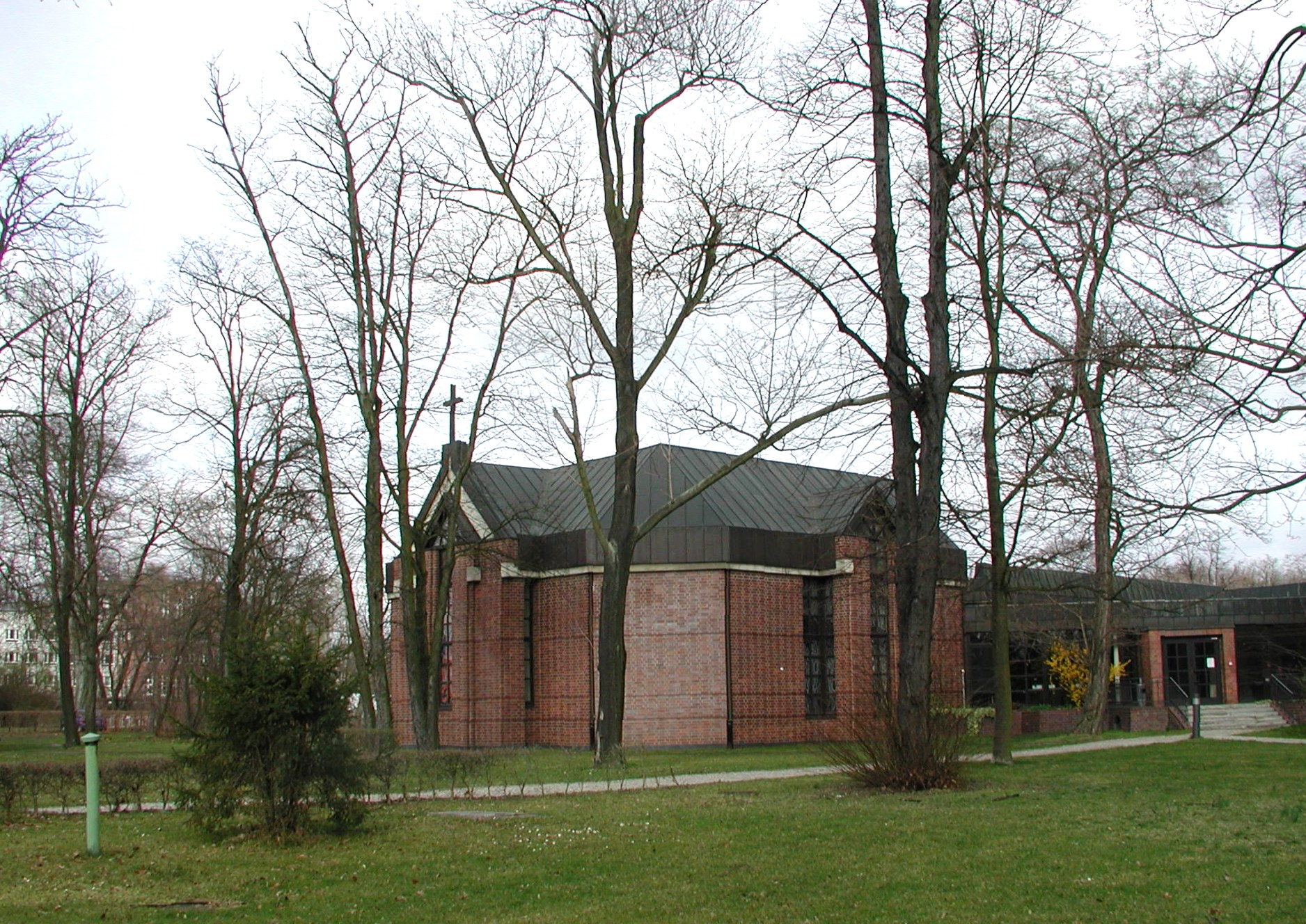 Kapelle, kleiner Sakralbau von 1986